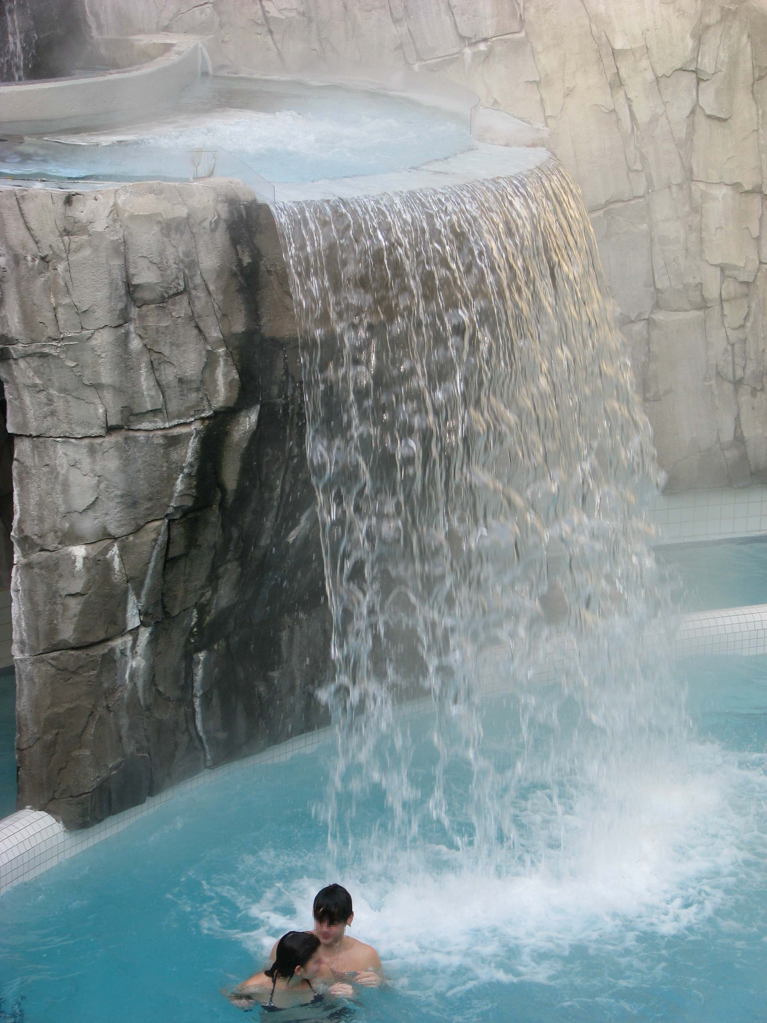 Wasserfall, Carolus Thermen, Aachen